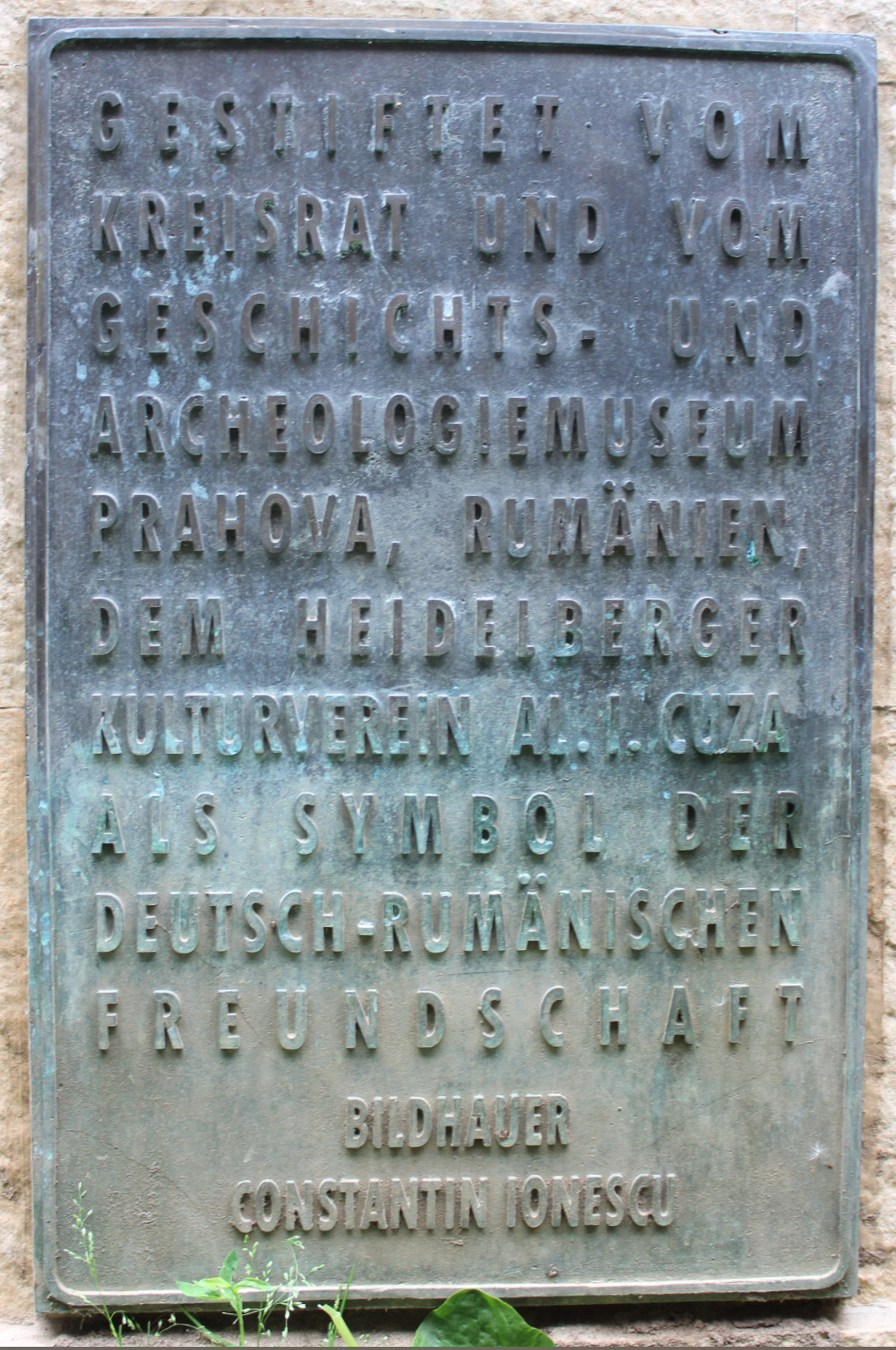 Das ist eine Plakette